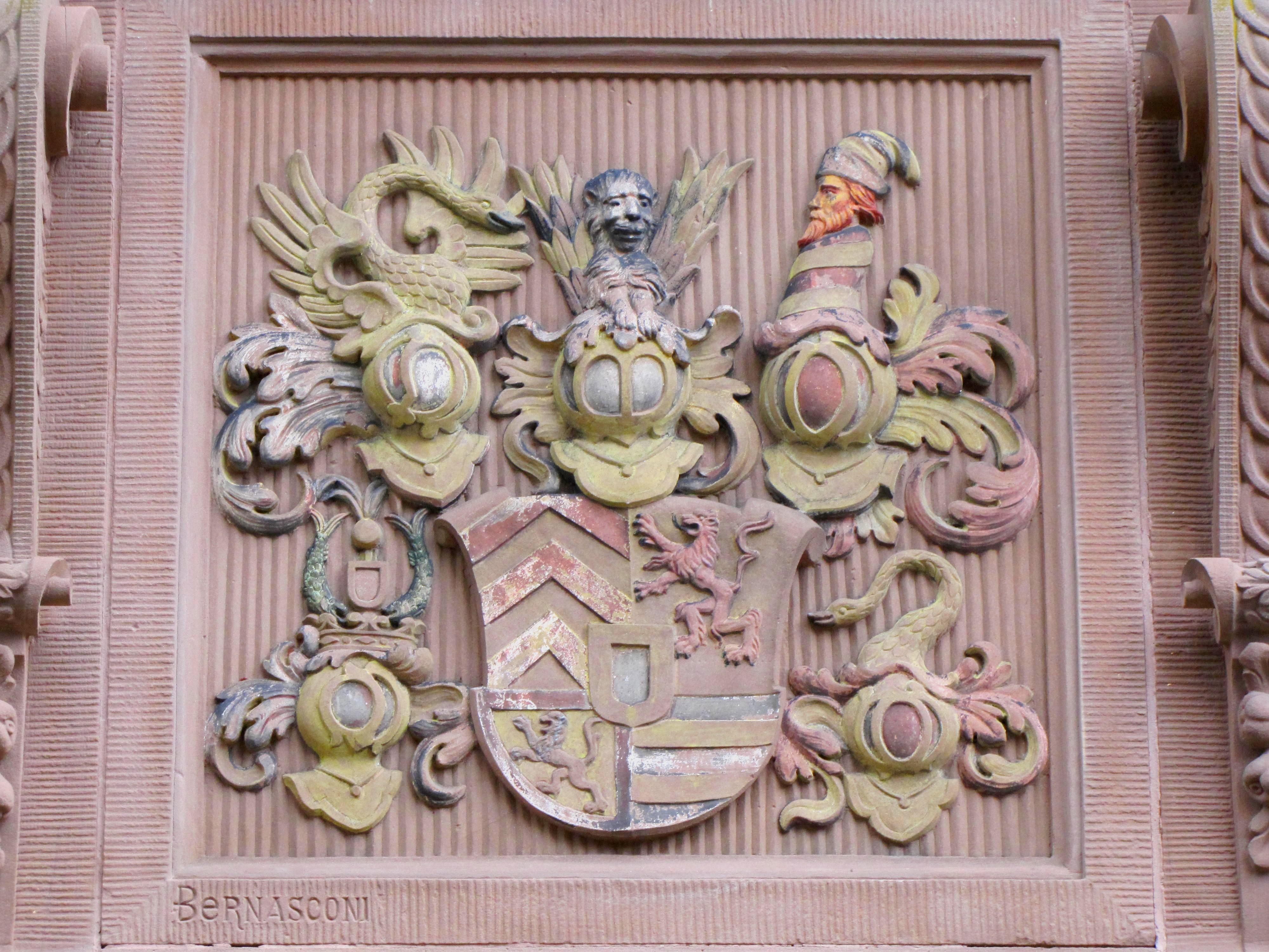 Alsace, Bas-Rhin, Bouxwiller, Ancienne Chancellerie du Comté de Hanau-Lichtenberg (XVIIe), Hôtel de ville, 1 place du Château (PA00084646, IA67009584).